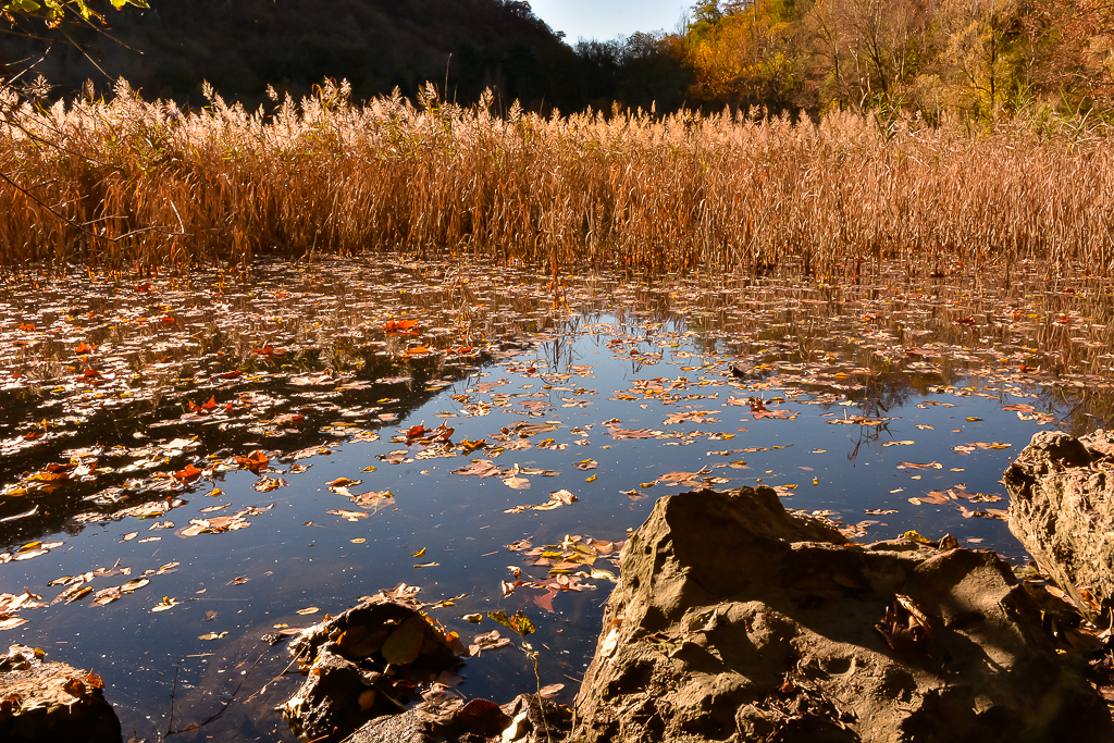 Lago di Ospedaletto di Gemona del Friuli (UD) - Italy